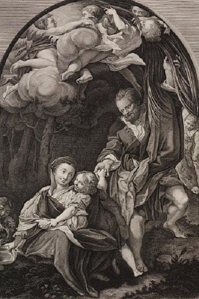 Incisione tratta dalla Madonna della scodella del Correggio.